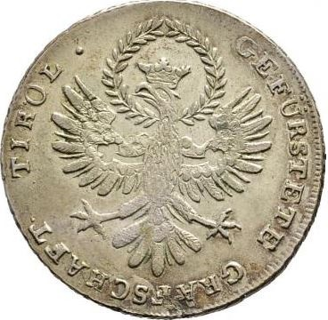 20 Kreuzer 1808, Tirol, Vorderseite